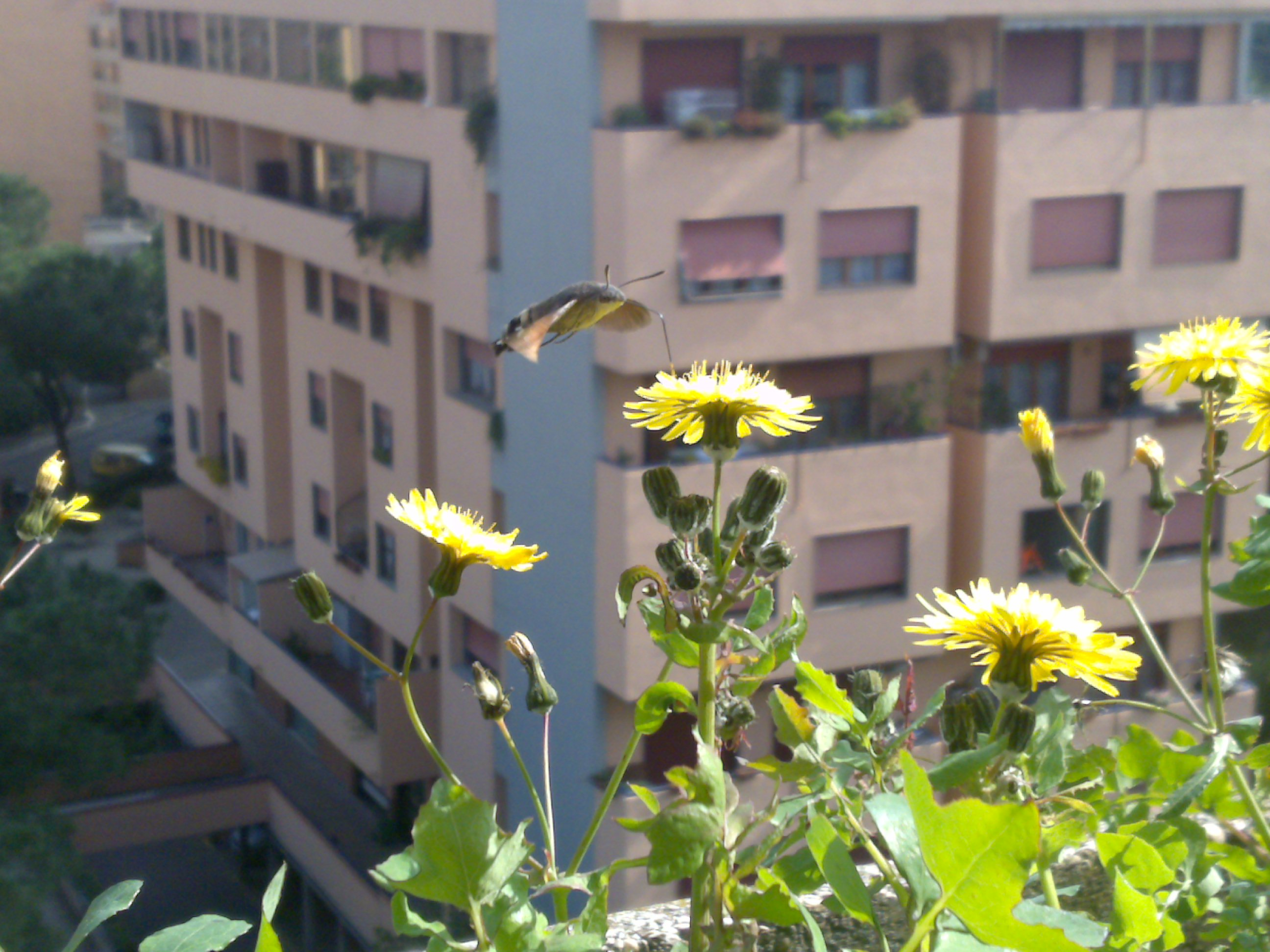 Macroglossum stellatarum foto scattata il 27 Febbraio 2009. Si dice che questo insetto vola da Agosto a Settembre ma forse le abitudini di questo insetto stanno mutando.